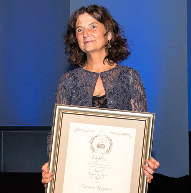 Antonina Krzysztoń odbiera nagrodę Per Artem Ad Deum podczas wystawy Sacroexpo 2016 w Kielcach